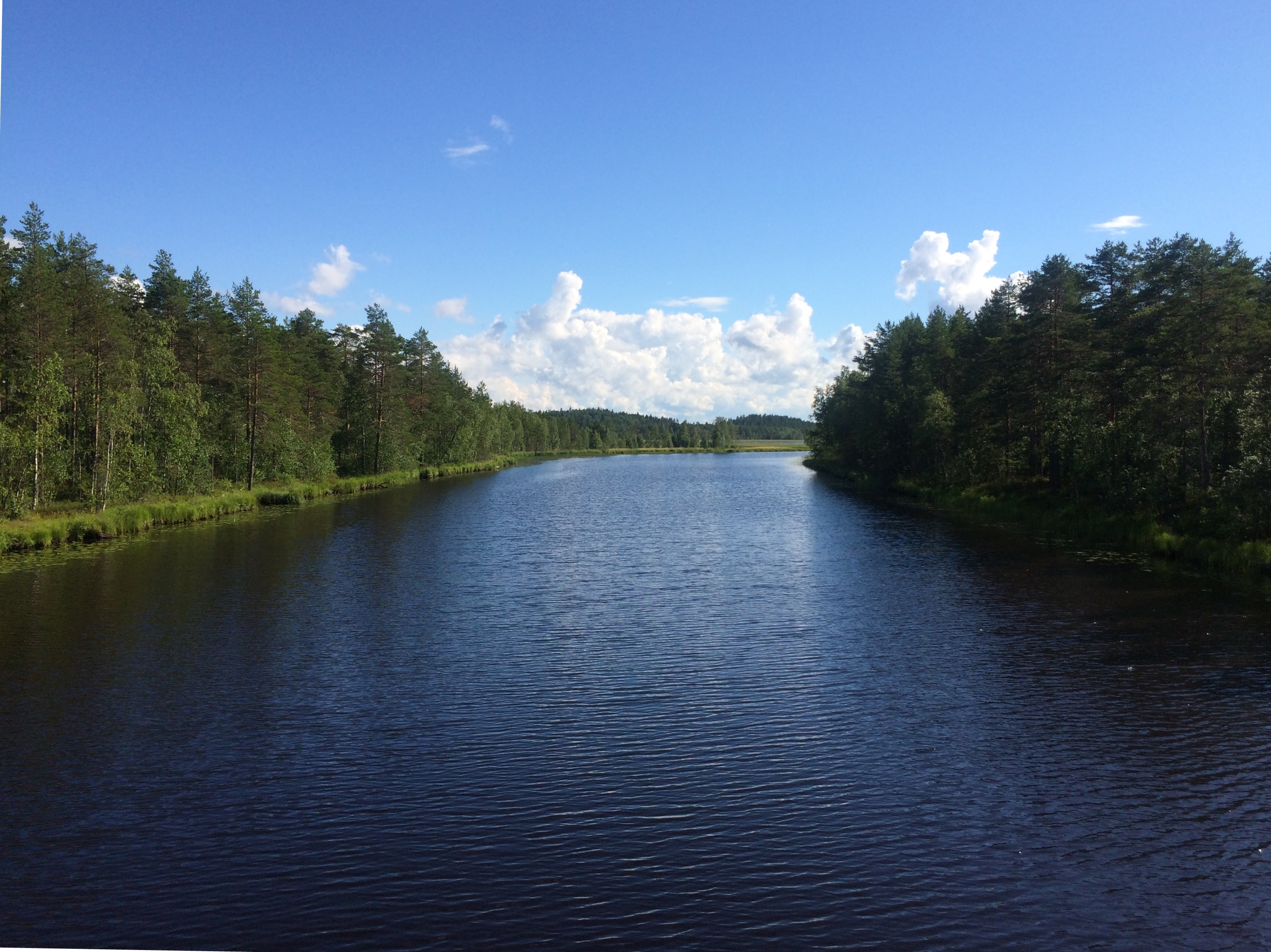 Малая Суна